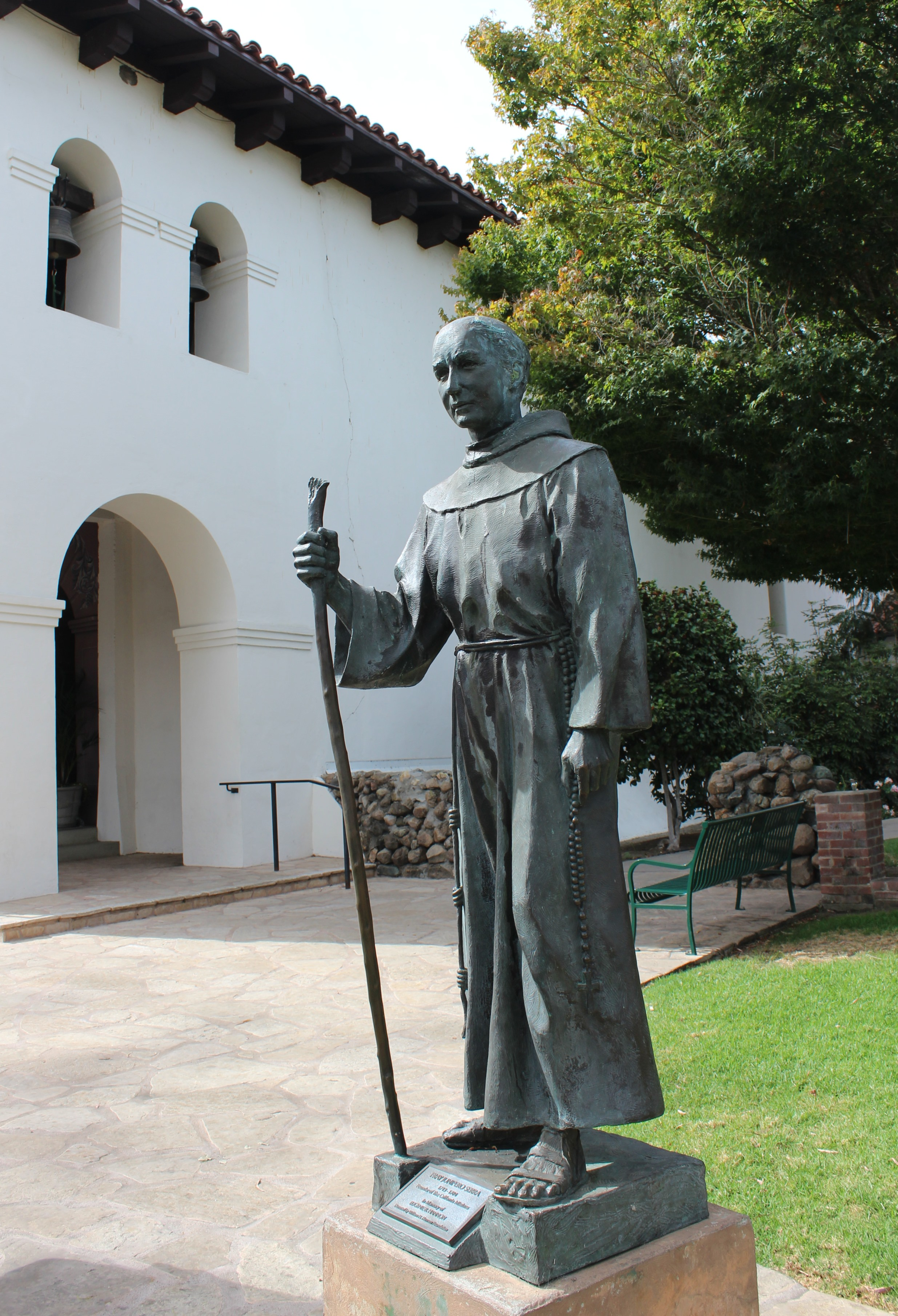 Mission San Luis Obispo de Tolosa, CA USA